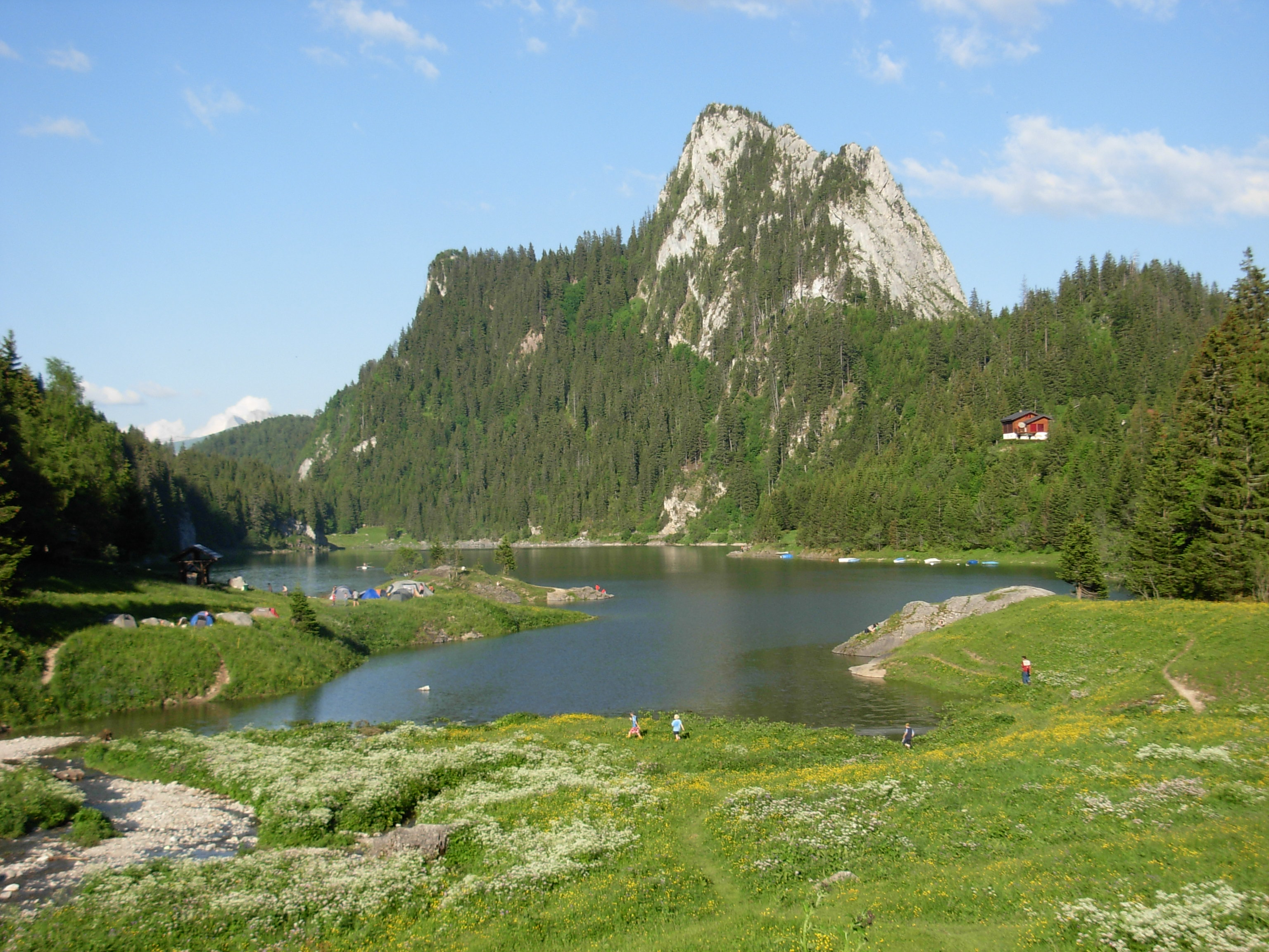 Le Lac de Taney avec le Tâche (alt. 1693 m). Juin 2008.